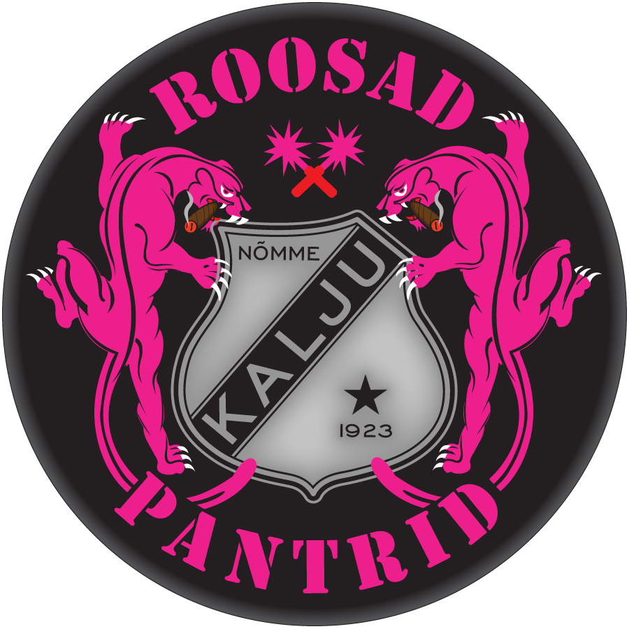 Roosad Pantrid - Nõmme Kalju fännid vapp